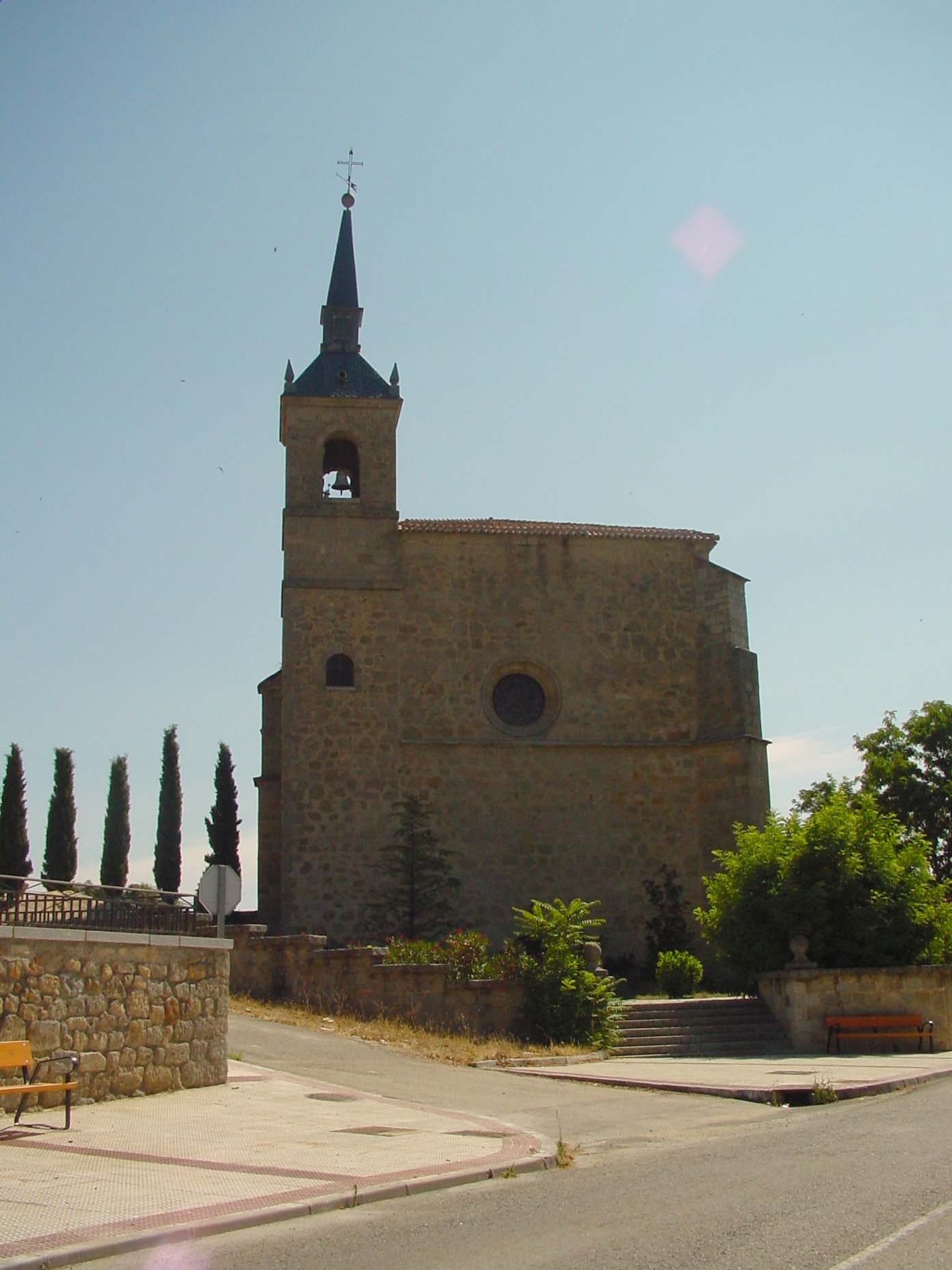 Vista de iglesia Nuestra Señora de la Estrella en Navalagamella.